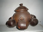 Articulo para el ponchePomaire